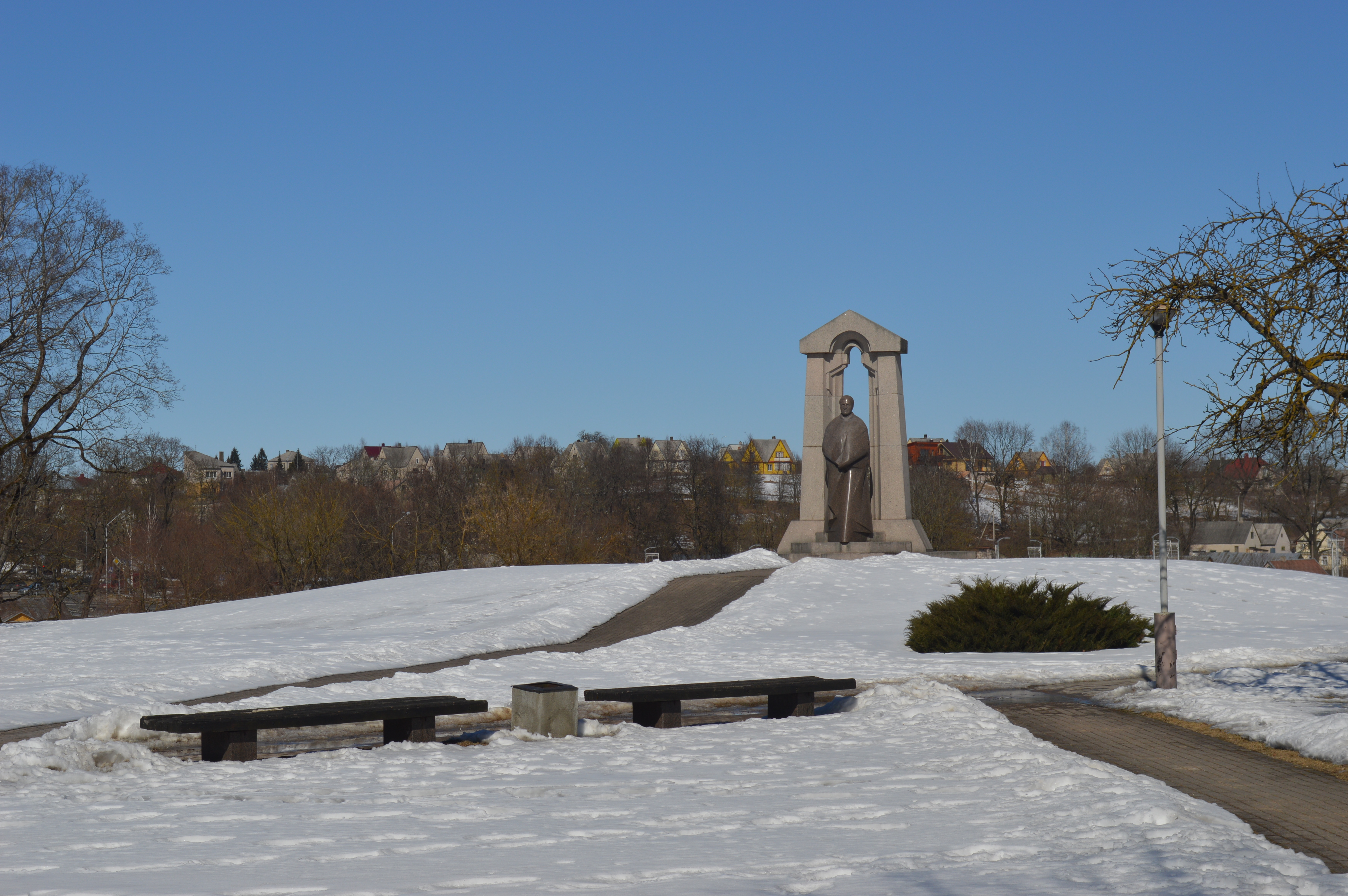 Antanas Baranauskas